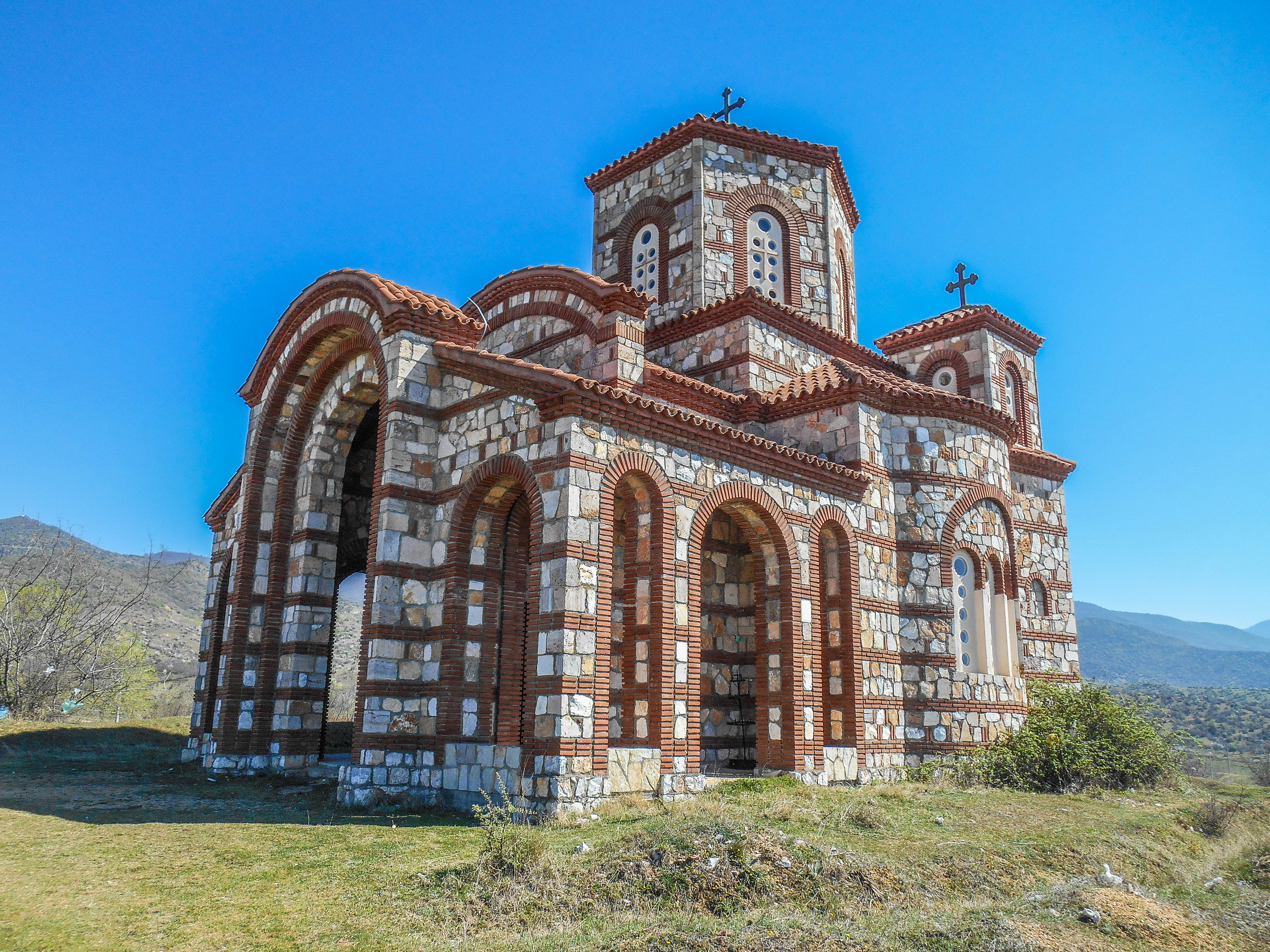 Црква „Св. Климент Охридски“ - Хамзали